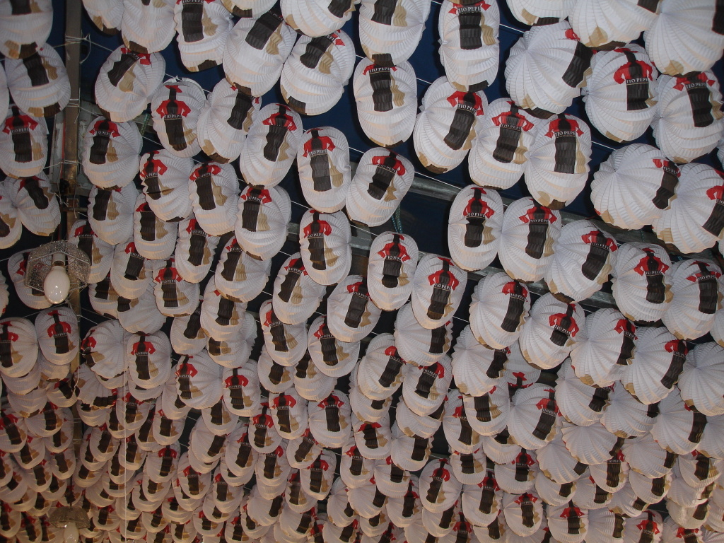 Farolillos: Caseta de la Feria del Caballo 2007, Jerez (Spain)